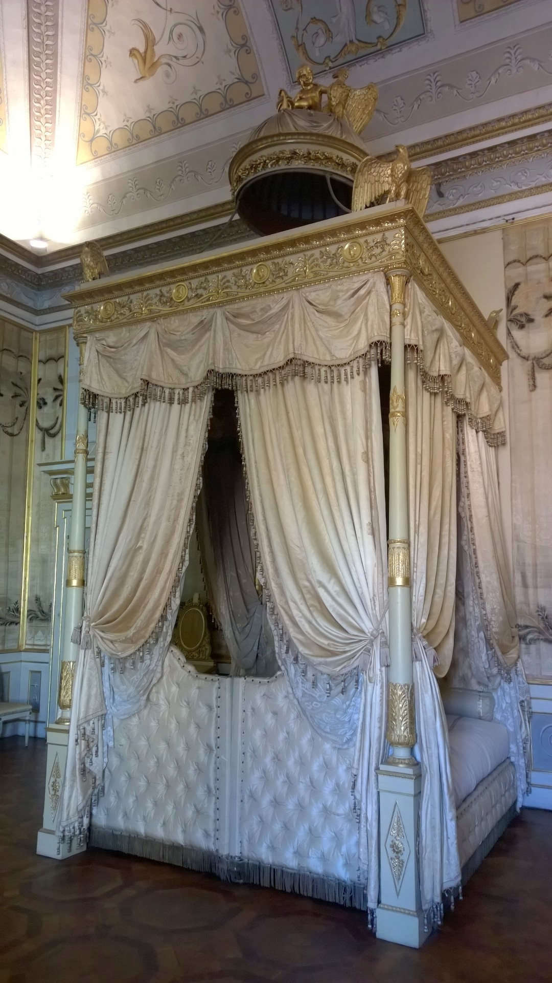 Letto a baldacchino del 1810 nell'Appartamento dell'Imperatrice nel Palazzo Ducale di Mantova.